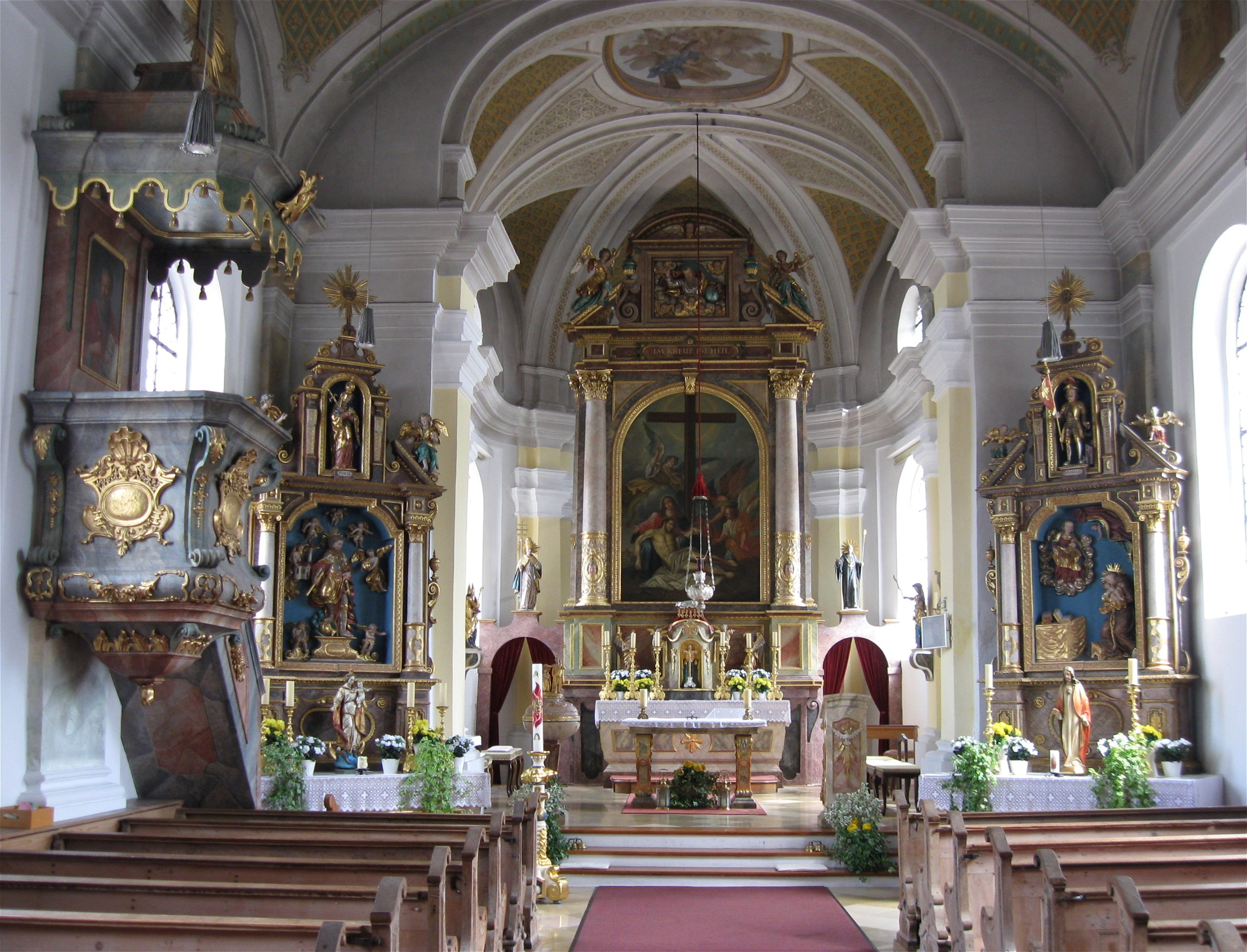 Innenraum, Katholische Pfarrkirche Hl. Kreuz, stattlicher Barockbau,1701-1723 von Johann Georg Ettenhofer erbaut; mit Ausstattung; Friedhof mit Grabdenkmälern, Ende 19./Anfang 20. Jahrhundert.